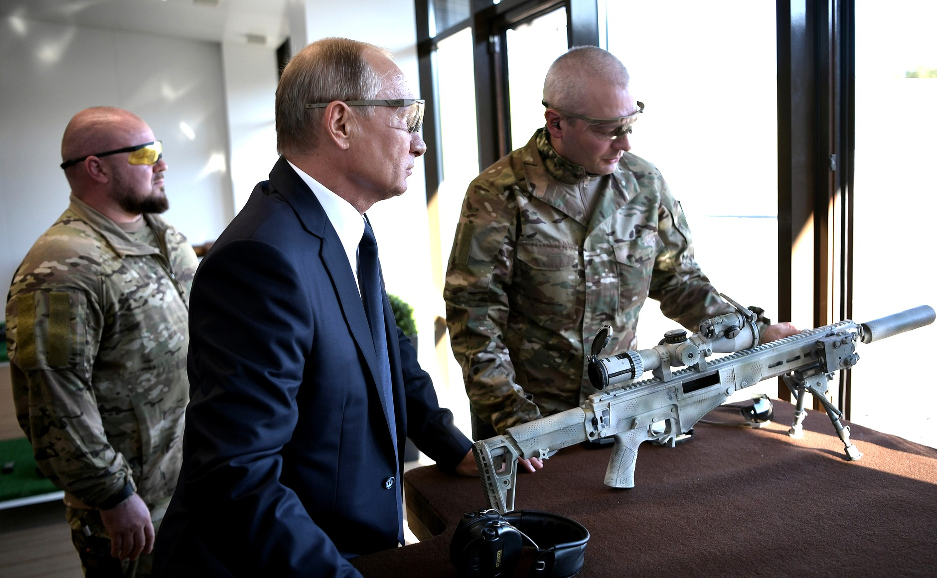 Посещение Президентом России Владимиром Путиным Военно-патриотического парка культуры и отдыха Вооружённых Сил Российской Федерации «Патриот». Во время посещения стрелкового центра концерна «Калашников».